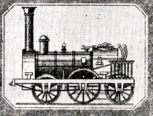 Lokomotive Pegasus